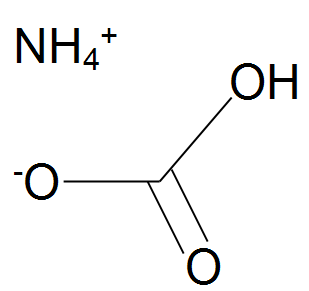 Ammonium bicarbonate molecule